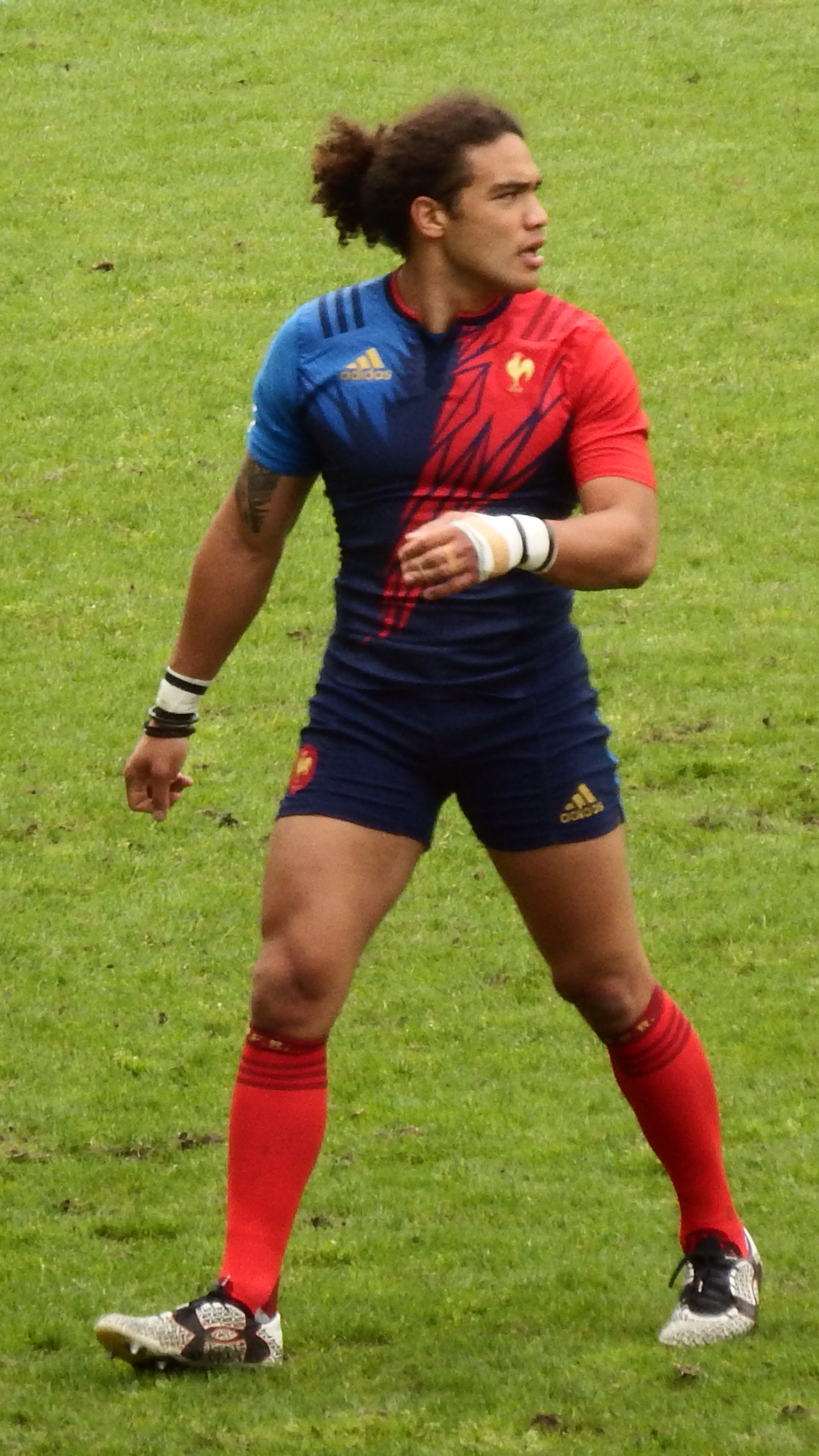 Paris Sevens 2016 — 14 May 2016, stade Jean-Bouin. Match between: Argentina — France